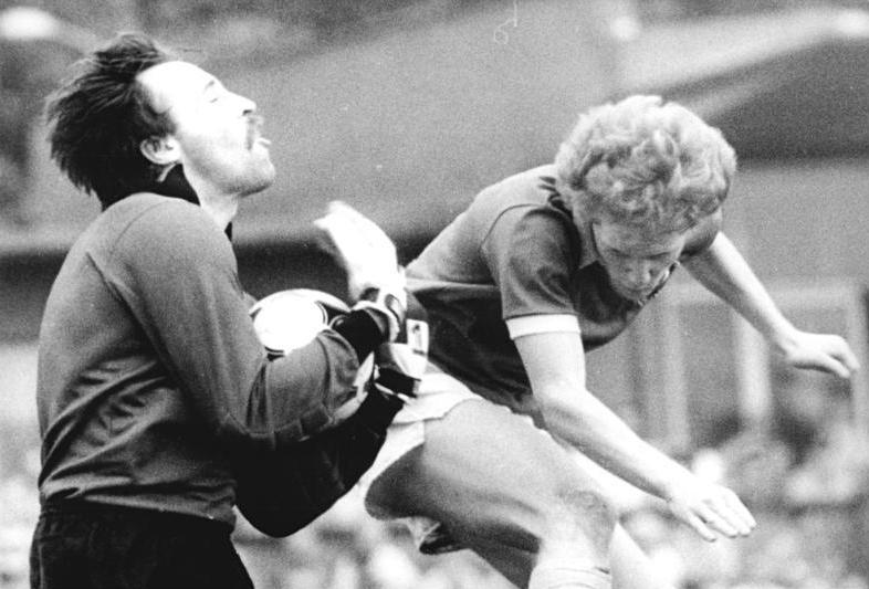 ADN-ZB-Häßler -7-5-86-ba-Dresden: Pokal-Überraschung. Gescheitert ist Matthias Sammer mit diesem Kopfball an Union-Torhüter Wolfgang Matthies - gescheitert ist der Pokalverteidiger Dynamo Dresden am 1. FC Union Berlin. Im Pokalspiel des Halbfinales um den FDGB-Pokal bereiteten die Dresdner ihrem Anhang mit einer 3:4 Niederlage abermals eine derbe Enttäuschung.